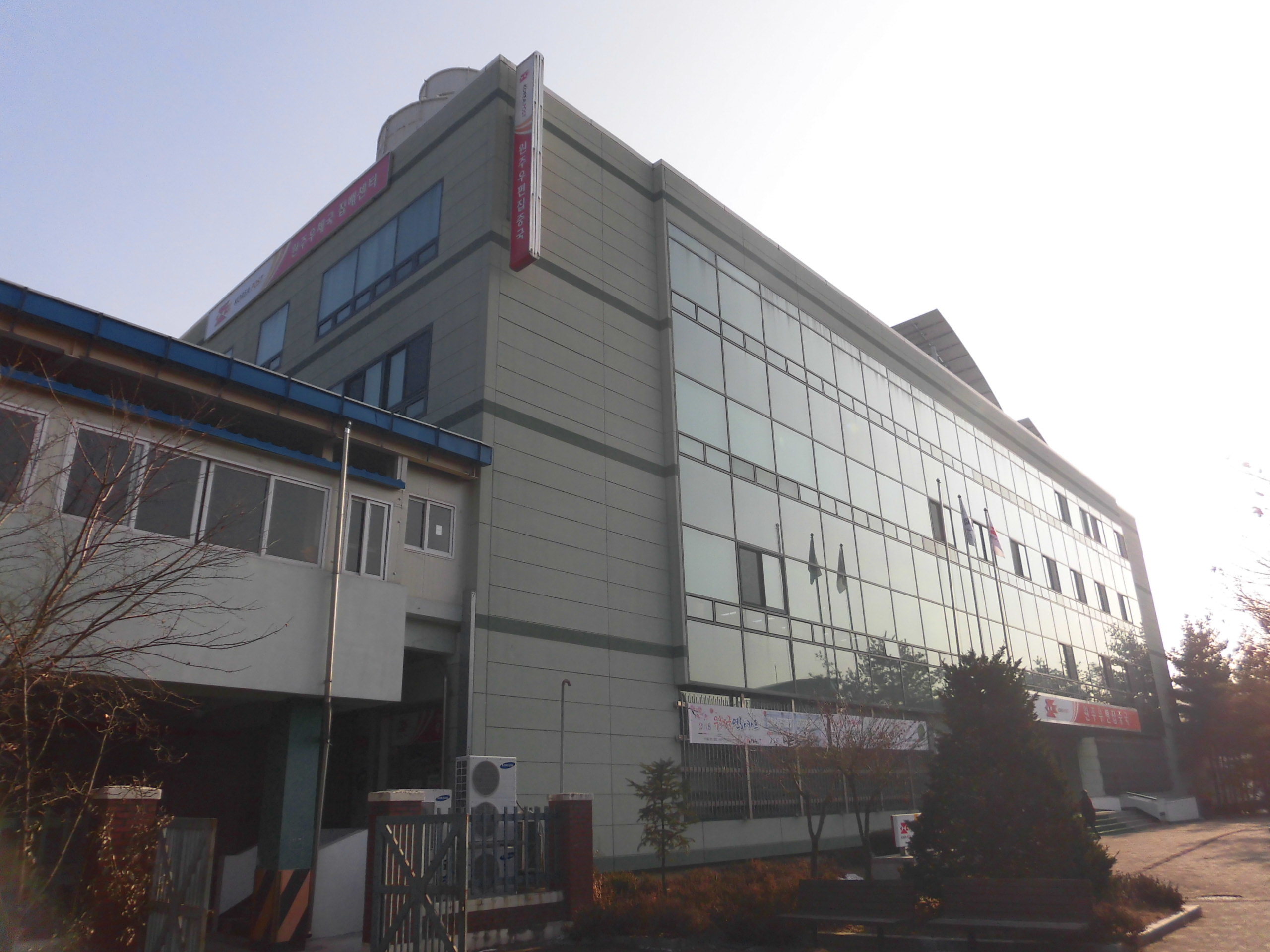 강원도 원주시에 있는 원주우편집중국 및 원주단대동우체국